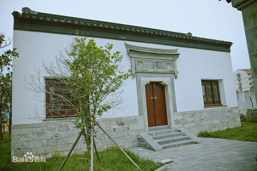 jianghanhuiguan